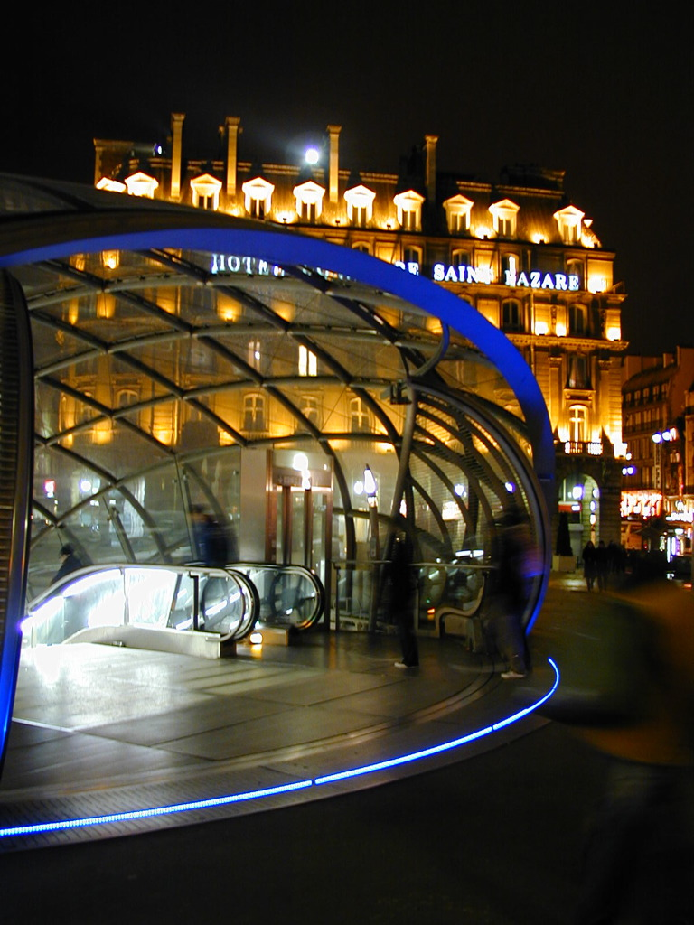 Paris Métro Entrée Station gare Saint-Lazare